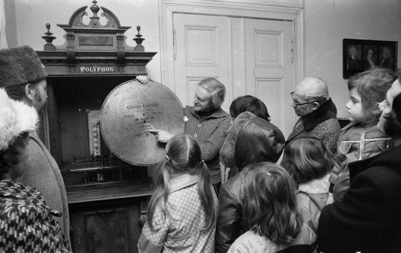 ADN-ZB / Rehfeld / 3.3.77 / Berlin: Ein Polyphon, ein Musikautomat, gehört zu den Schätzen des Gründerzeit-Museums in Berlin-Mahlsdorf. Der Inhaber der Sammlung, Lothar Berfelde (Hintergrund Mitte), erklärt den Besuchern gern alles und führt auch die Instrumente vor. Der ehrenamtliche Mitarbeiter der Denkmalpflege hat 33 Jahre lang Möbel und Hausrat der Gründezeit zusammengetragen. Er kann jetzt fünf komplette Zimmereinrichtungen, eine historische Gastwirtschaft, Musikautomaten, Grammophone, Uhren, Leuchter und andere Gegenstände ausstellen. Jeden Sonntag finden in dem Haus am Hultschiner Damm 333, einem um 1750 erbauten ehemaligen Gutshaus um 11 und 12 Uhr Führungen statt, werktags nach Anmeldung. Abgebildete Personen: Berfelde, Lothar: Inhaber des privaten Gründerzeitmuseums Berlin-Mahlsdorf, DDR (GND 119092093)